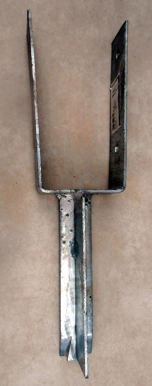 Mittelschwerer Pfostenanker, Trägerelement für vertikale Holzbalken aus verzinktem Stahl zum Einbetonieren. Pfostenanker werden in sehr unterschiedlichen Begriffen auf den Markt gebracht, wie Pfostenschuh, Pfostenträger, Stützenschuh (oder sogar Betonanker, was jedoch zu Verwechslungen führen kann). Pfostenanker gibt es in U-Form, L-Form, H-Form oder T-Form. Sie dienen der stabilen Befestigung von Balken für Carports, Vordächer und Pergolen und auch Zäunen. Pfostenanker können auch in Edelstahl ausgeführt sein. Der Abstand zum Erdreich sorgt für konstruktiven Holzschutz, denn bei direktem Erdkontakt ist Holz - je nach Holzart mehr oder weniger schnell - der Fäulnis ausgesetzt.